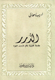 Ադիբ Իսհակ, Մարգարիտներ